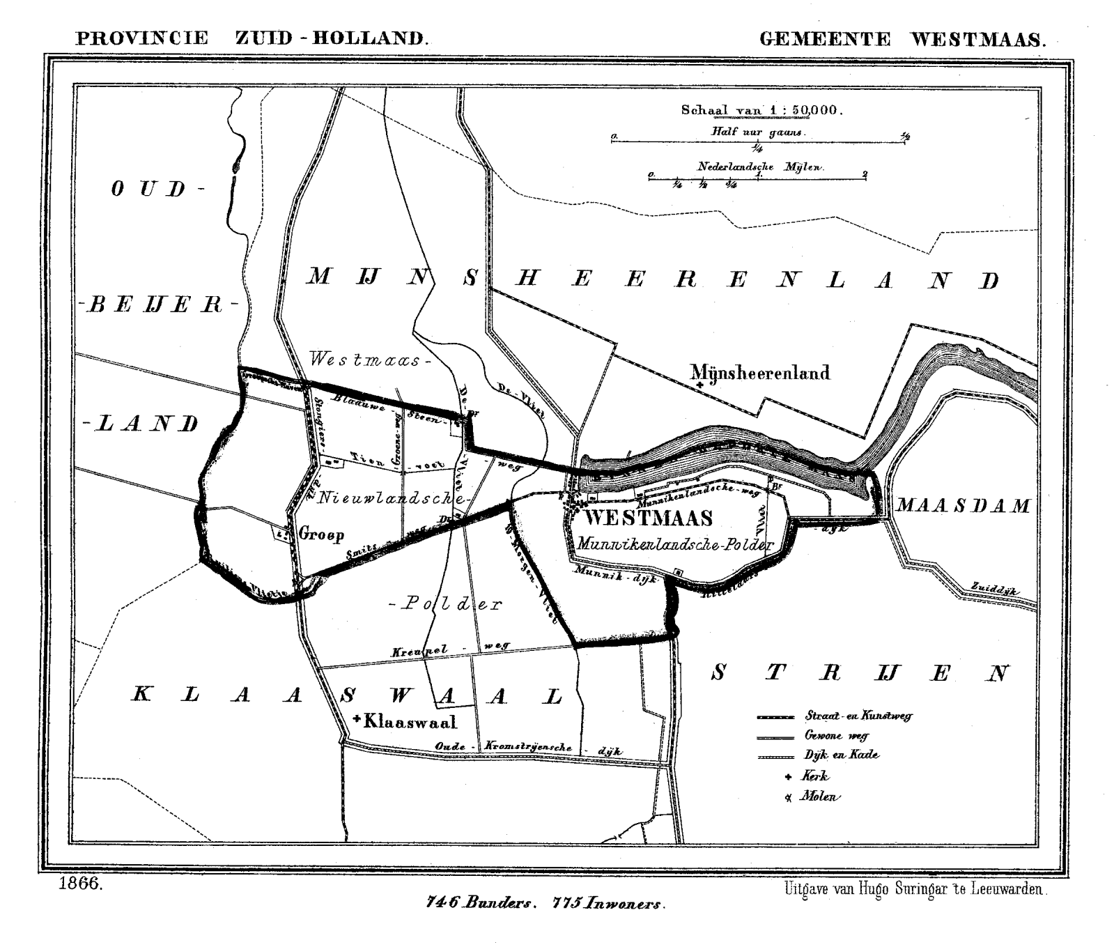 bron